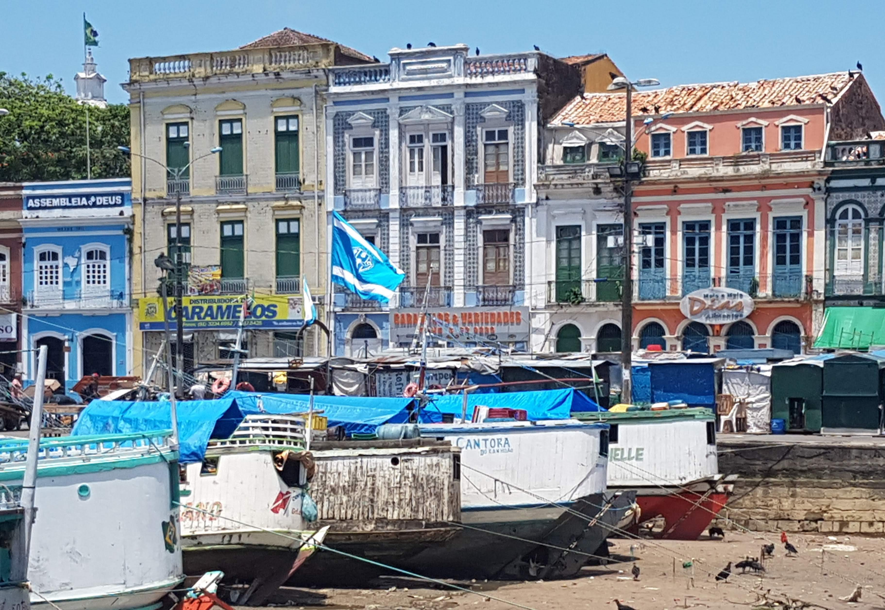 Belém/Pará - próximo ao Mercado Ver-o-Peso